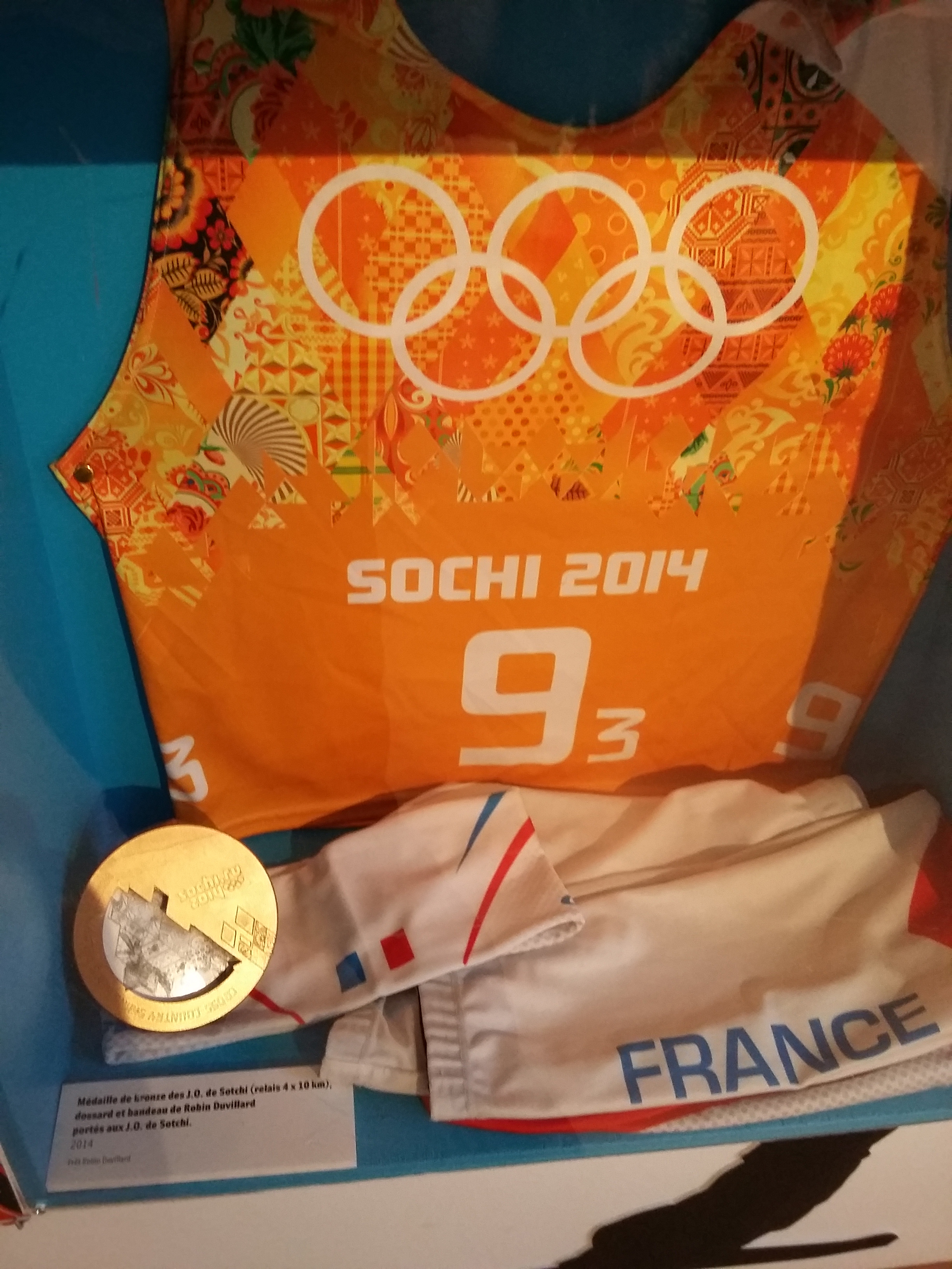 Dossard et médaille de bronze du skieur de fond français Robin Davillard aux jeux olympiques de Sotchi en 2014.